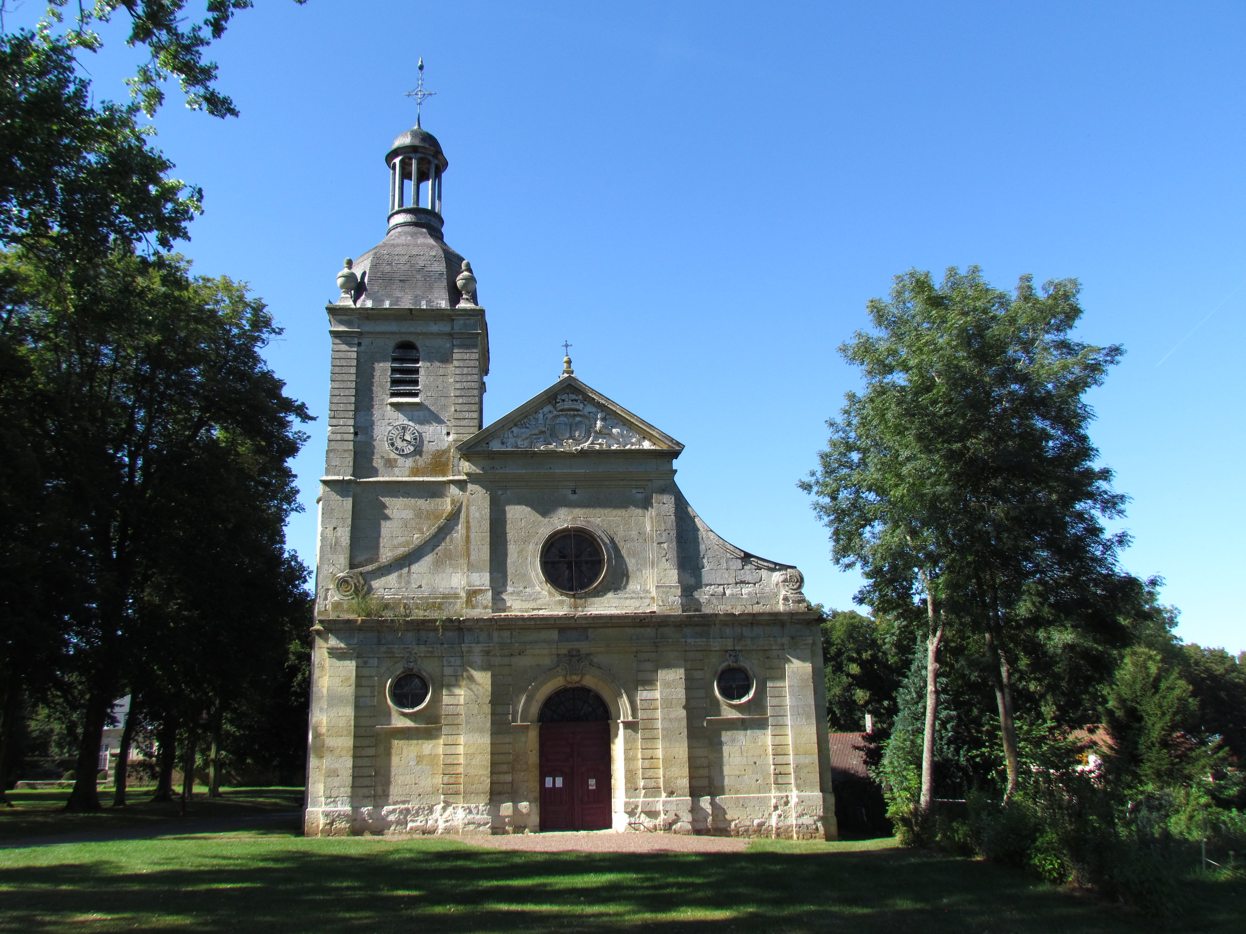 Église Saint-Jacques-le-Majeur d'Essertaux, (Inscrit, 1969) .